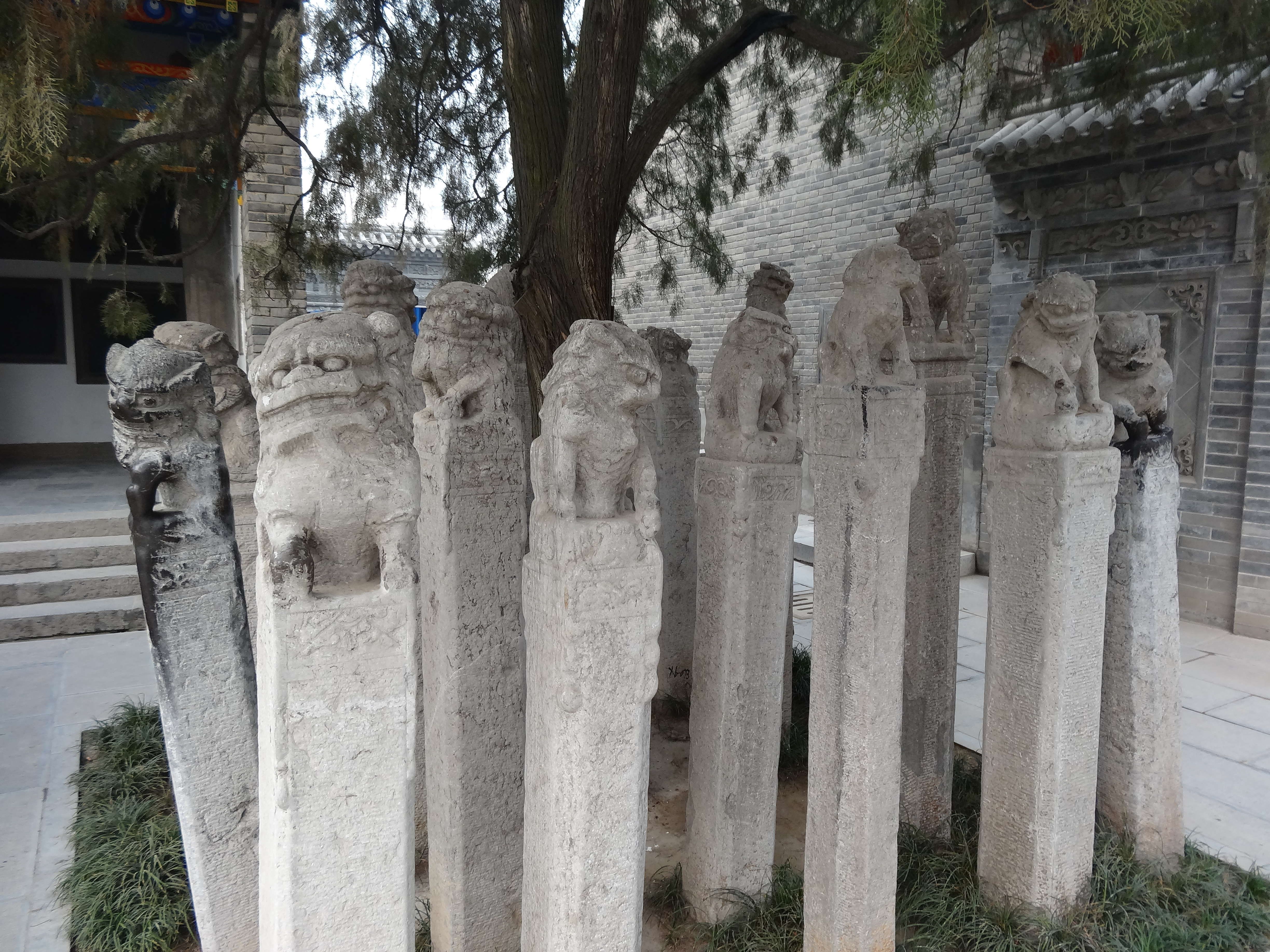 咸阳博物馆内收藏的拴马桩